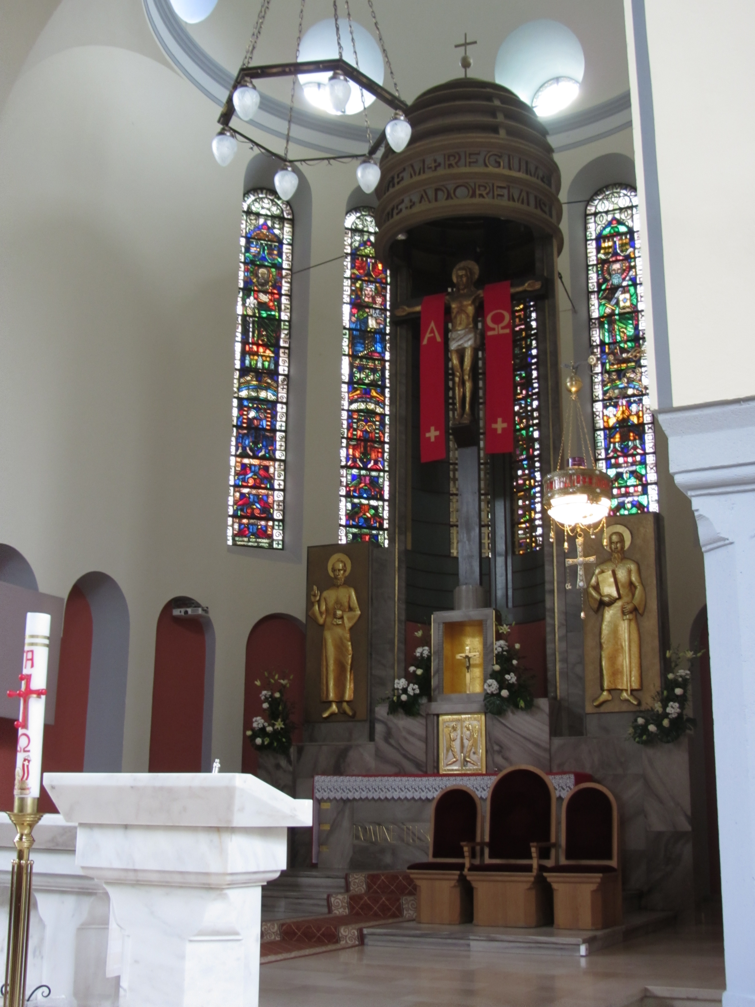 Der Altar der St. Peter und Paul Kirche in Oppeln (poln. Opole)